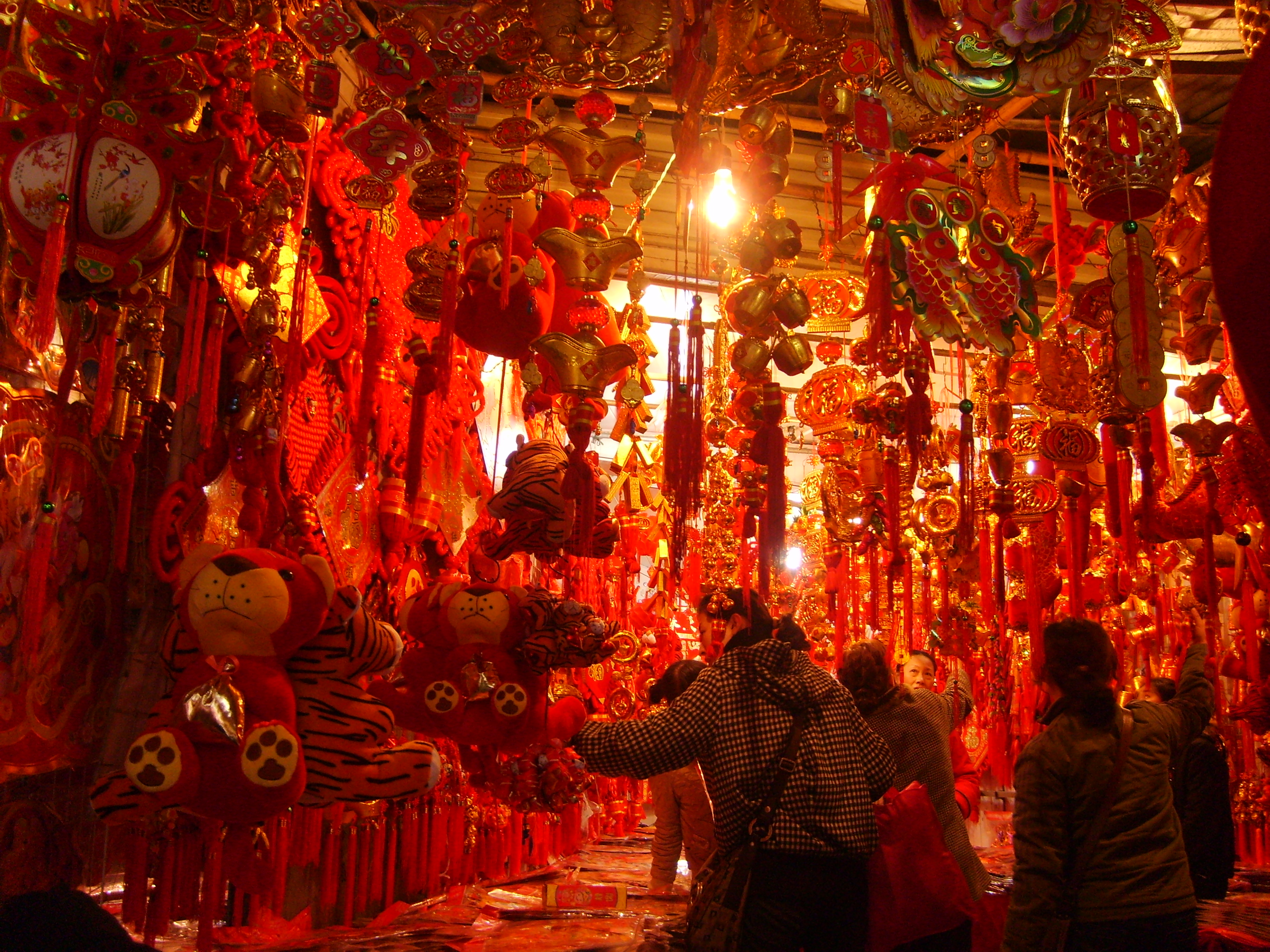 红红火火过新年